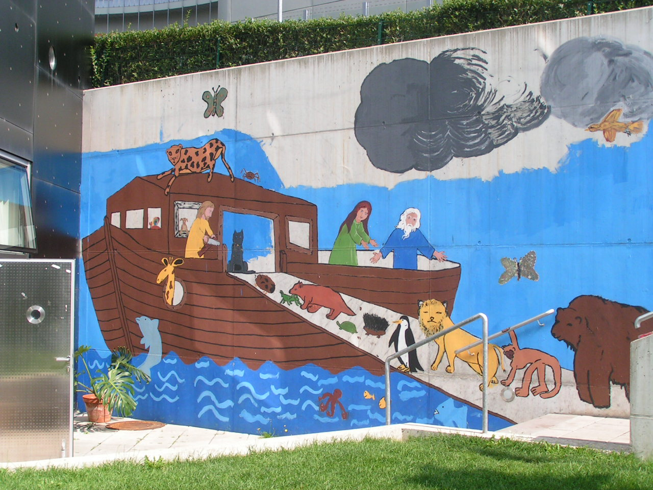 Donaucitykirche Außenansicht Arche